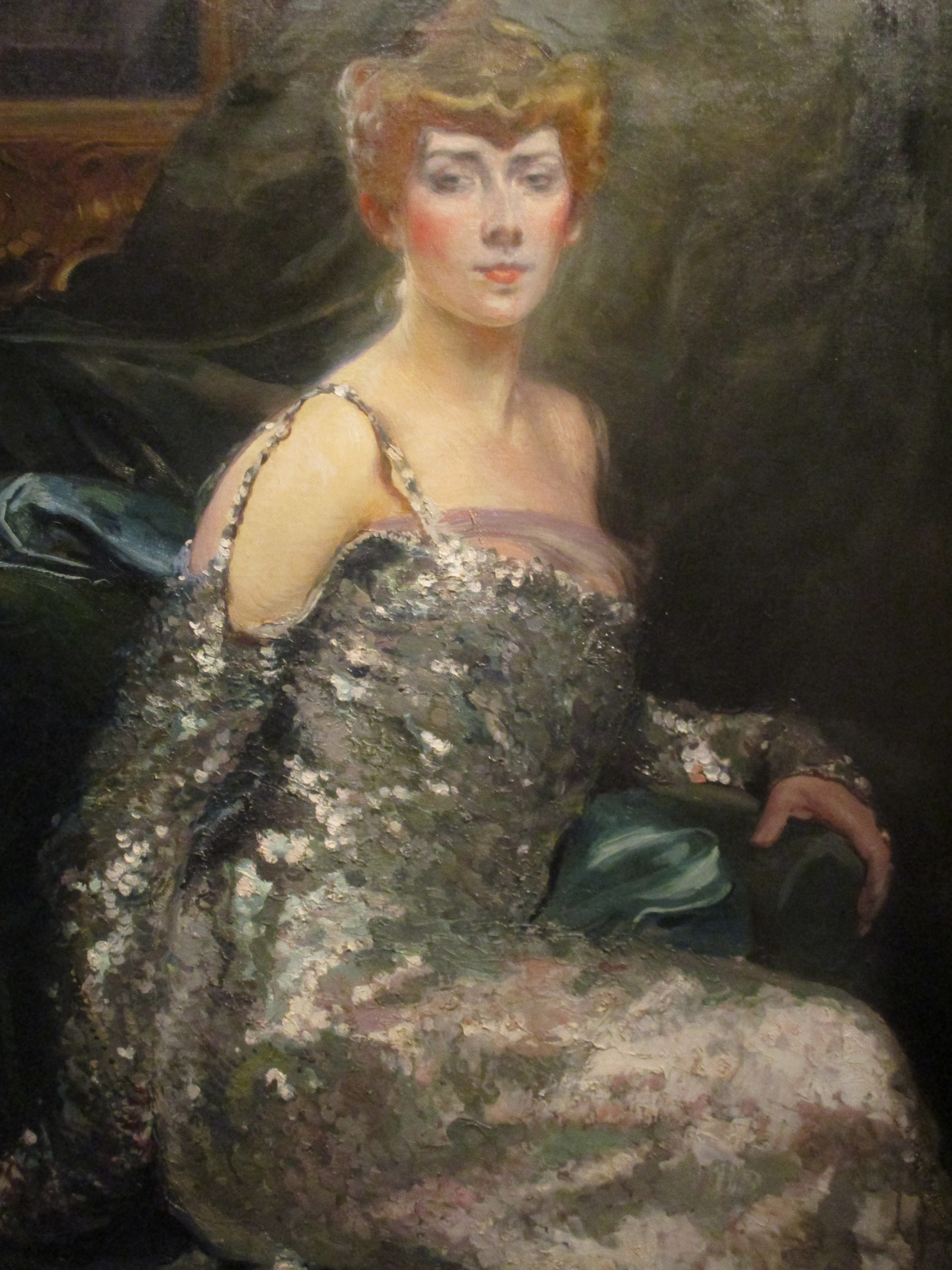 Albert Besnard, Portrait de la comtesse Maurice Pillet-Will, née Isabelle de Comminges (1874-1953), collection Lucile Audouy.